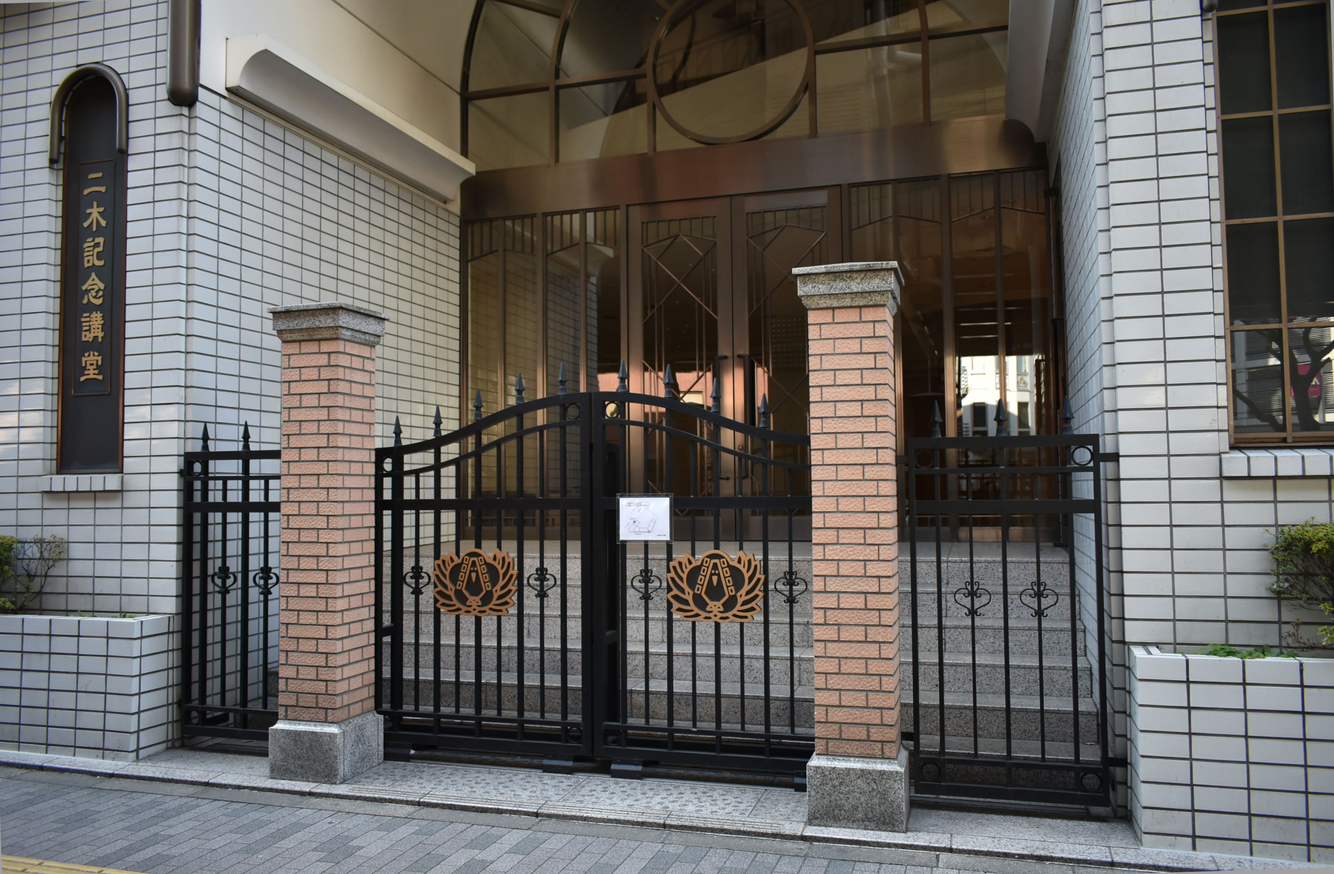 豊島岡女子学園中学校・高等学校 Nikon D3400